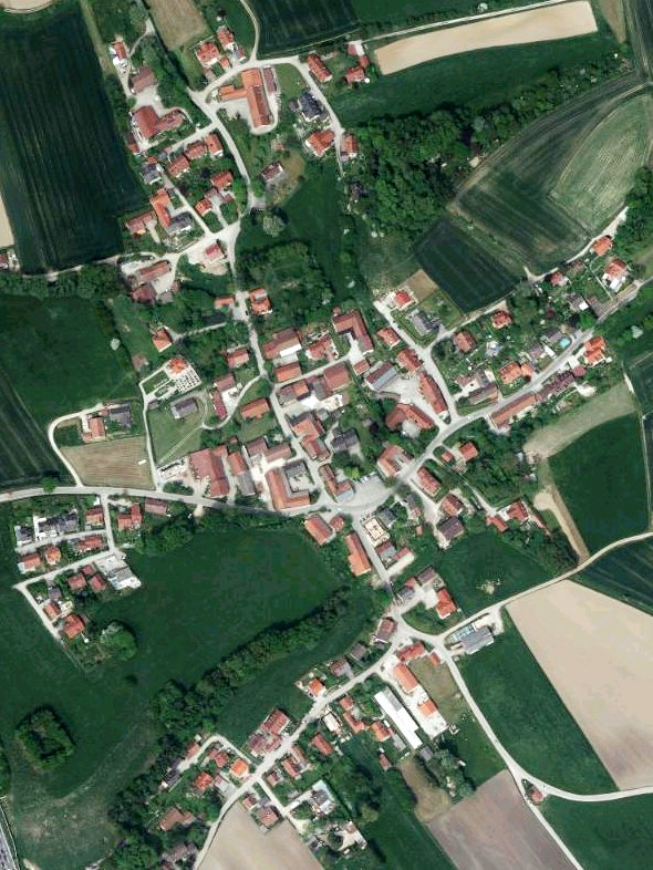 Luftaufnahme der Bayerischen Vermessungsverwaltung: Fürholzen, Gemeinde Neufahrn, Landkreis Freising, Regierungsbezirk Oberbayern, Bayern.